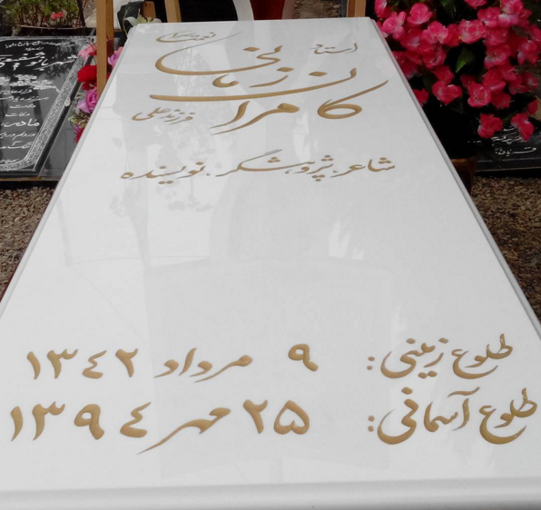 تصویر شماره دو: مزار زنده یاد استاد کامران زمانی نعمت سرا